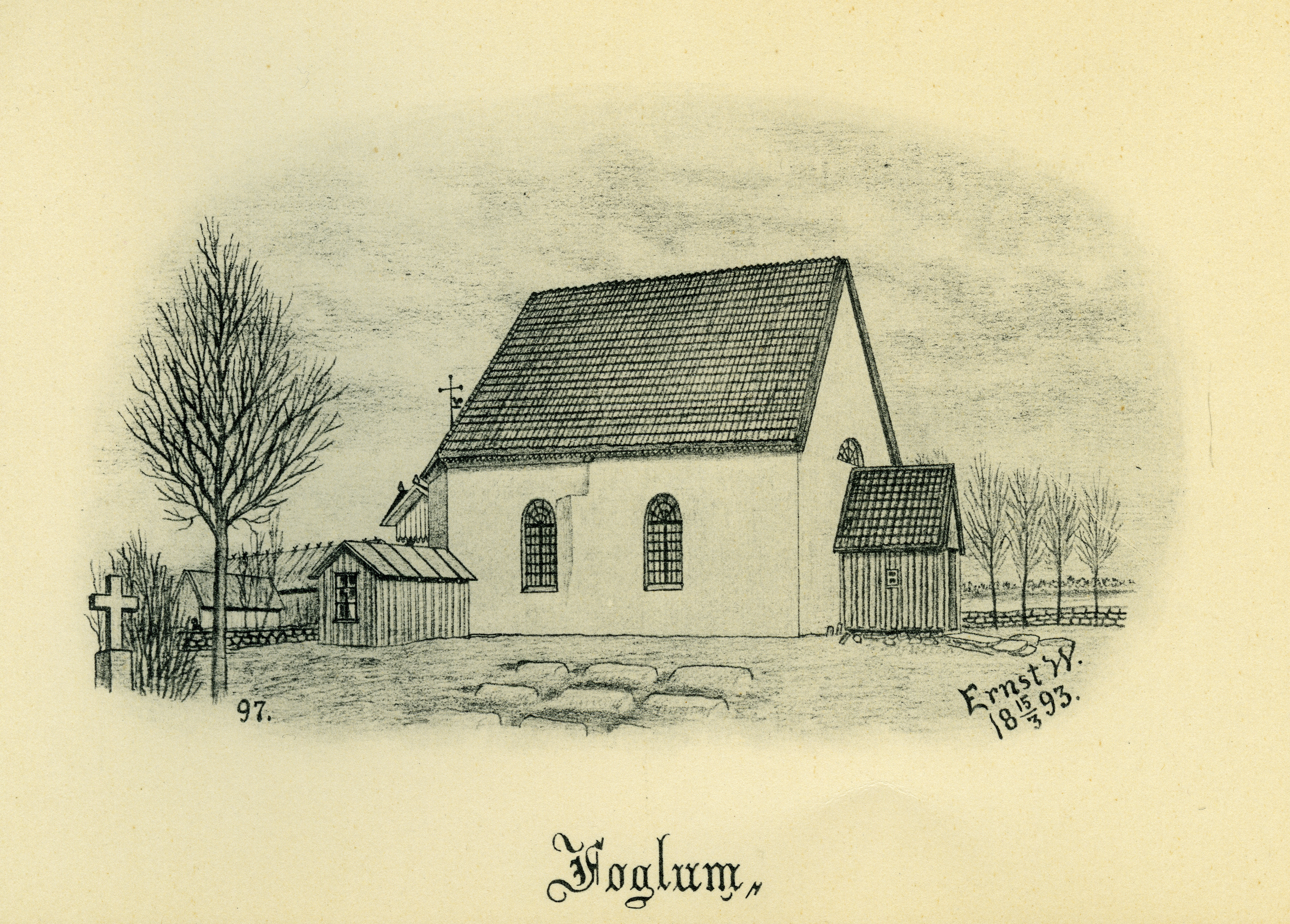 Fåglums kyrka år 1893 i Barne härad, Skara stift, Västergötland, Sverige. Teckning av Ernst Wennerblad ur Skara stifts kyrkor (1902).